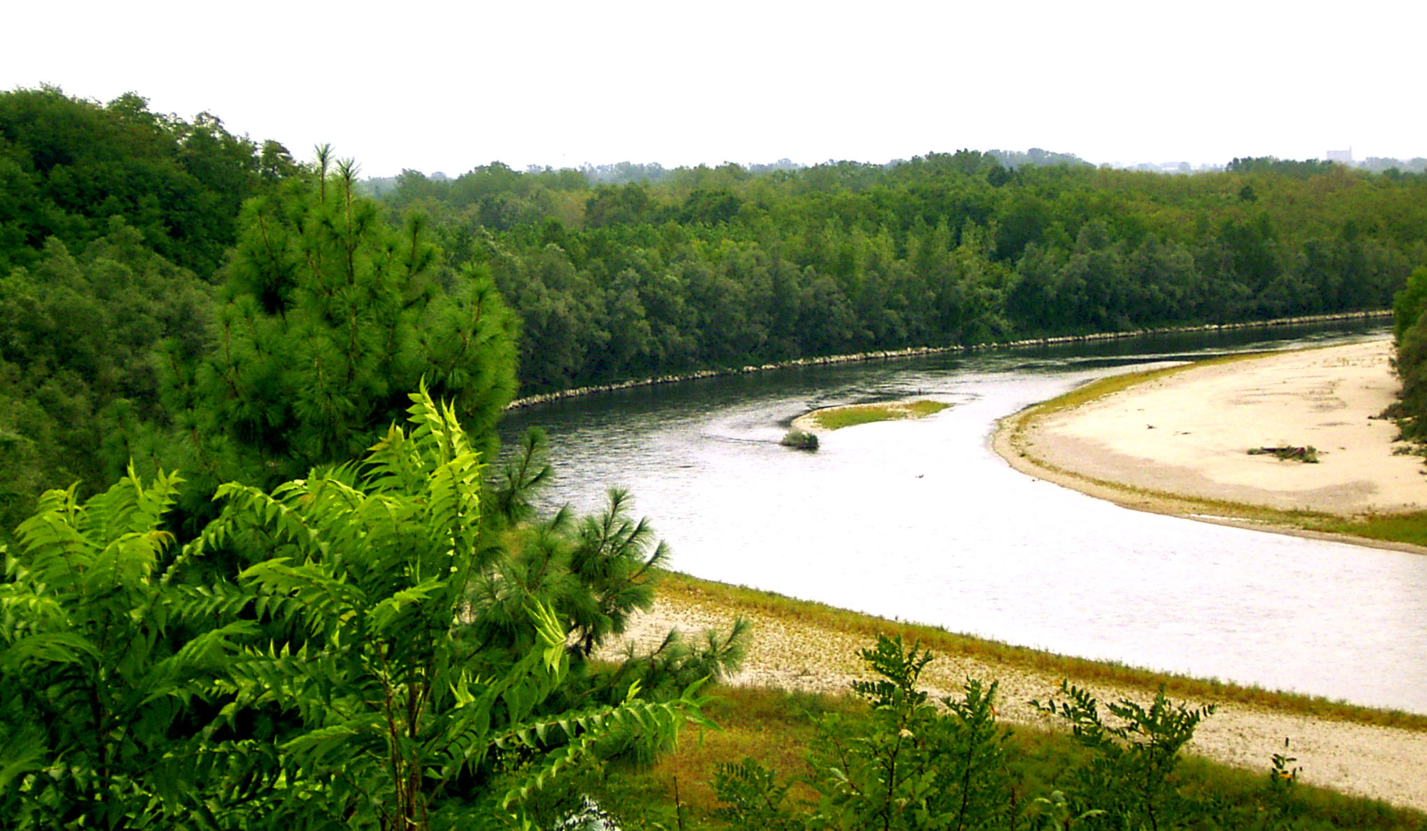 Una curva del fiume Ticino nei pressi di Pavia (frazione Massaua di Torre d'Isola).